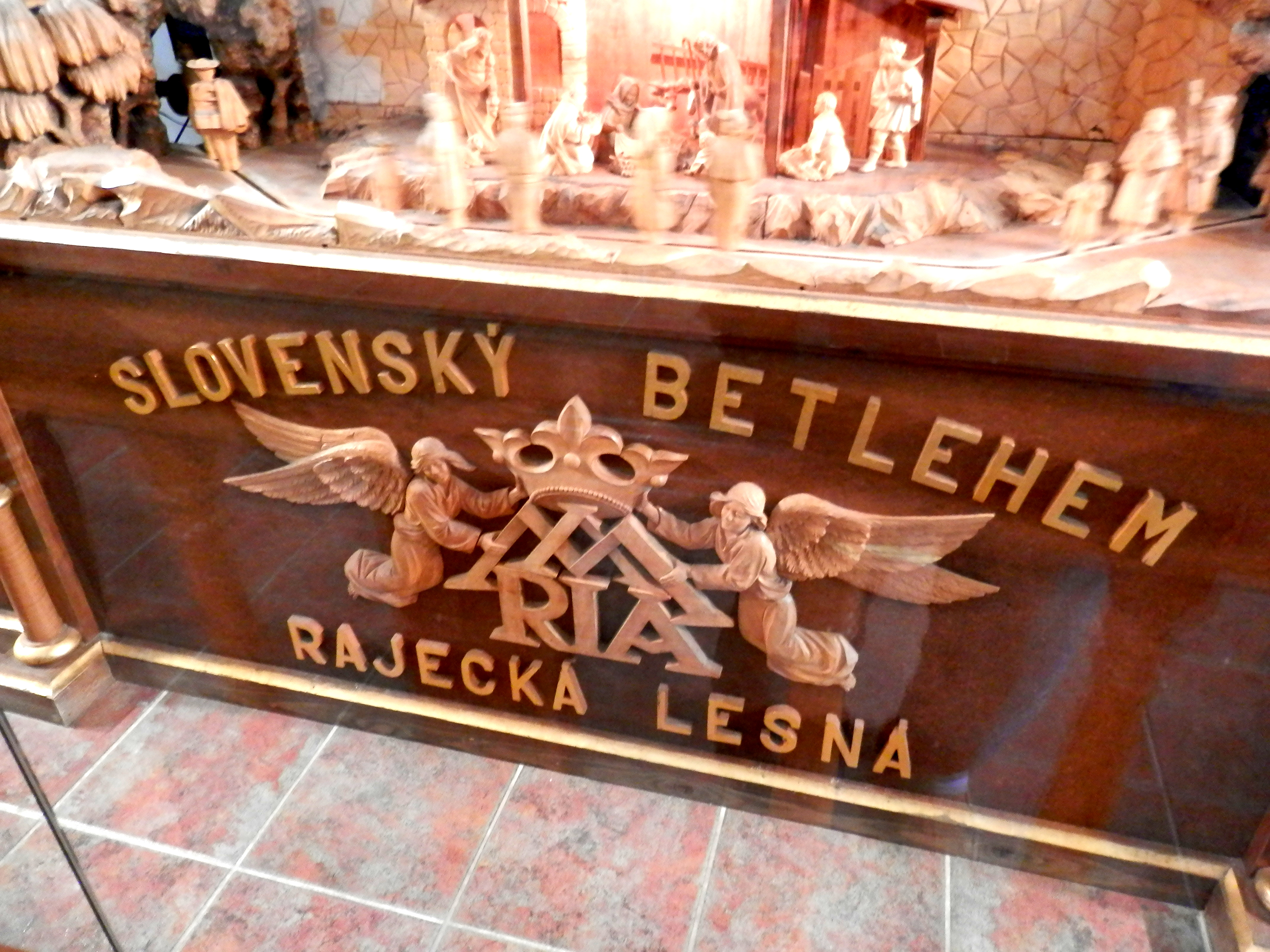 Jar 2018. Detail. Slovenský betlehem, otvorený bol 26.11.1995. Autor rezbár Pekara. Rozmery 8,5x3x2,5 metra. Obec Rajecká Lesná. Okres Žilina. Slovensko.